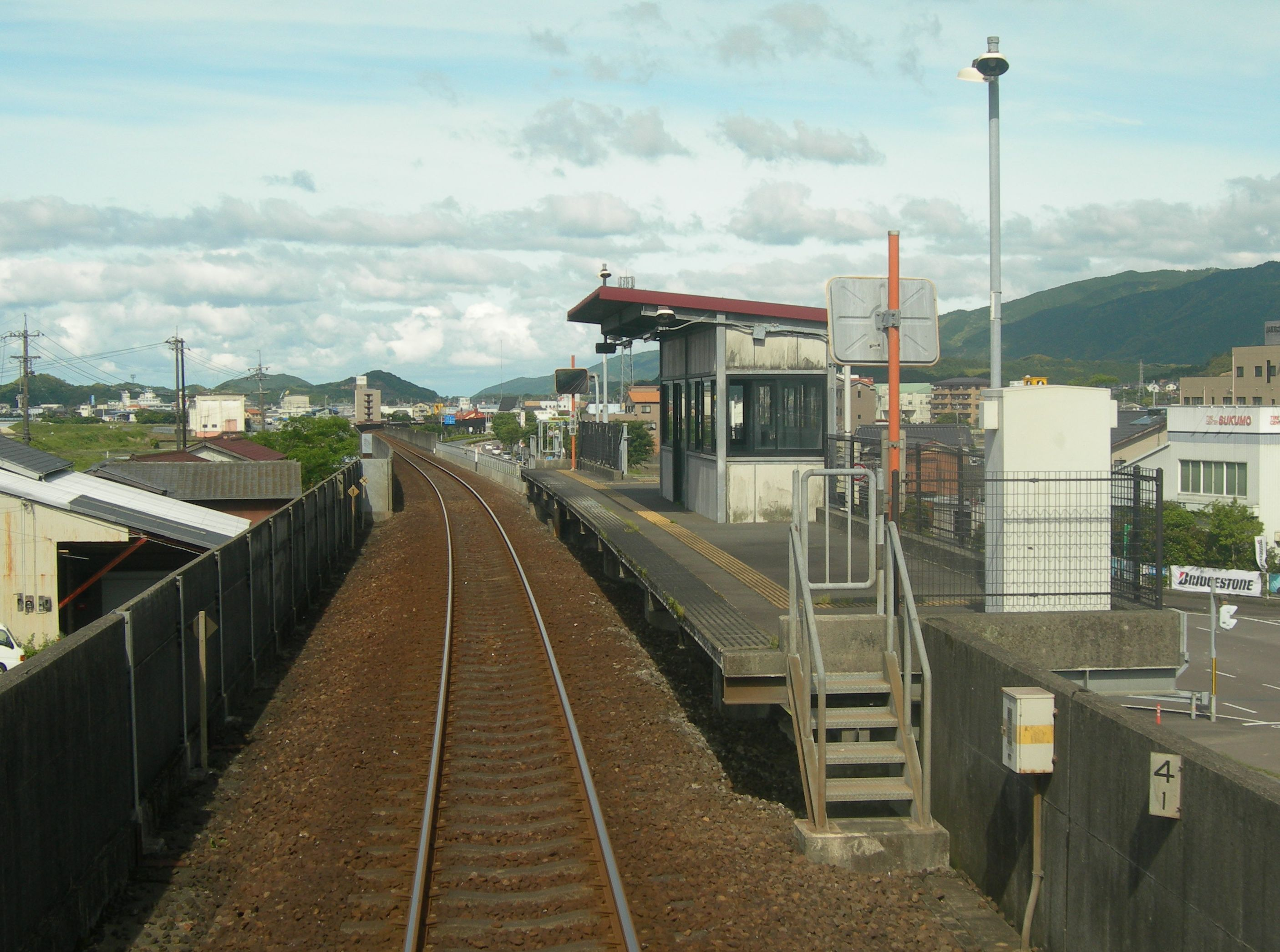 土佐くろしお鉄道東宿毛駅ホーム